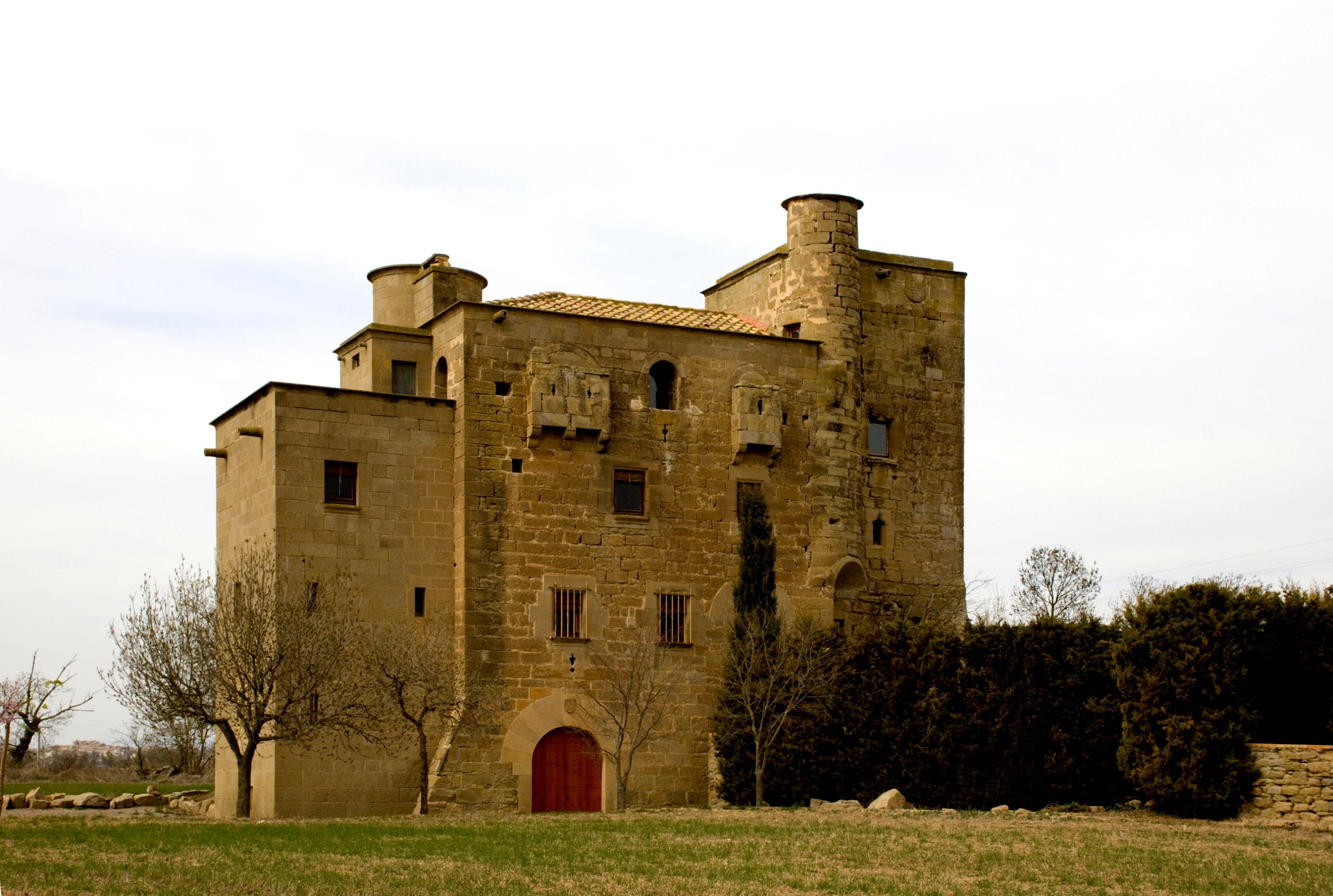 Castell-molí de Ratera Object location41° 45′ 02.24″ N, 1° 13′ 27.57″ E